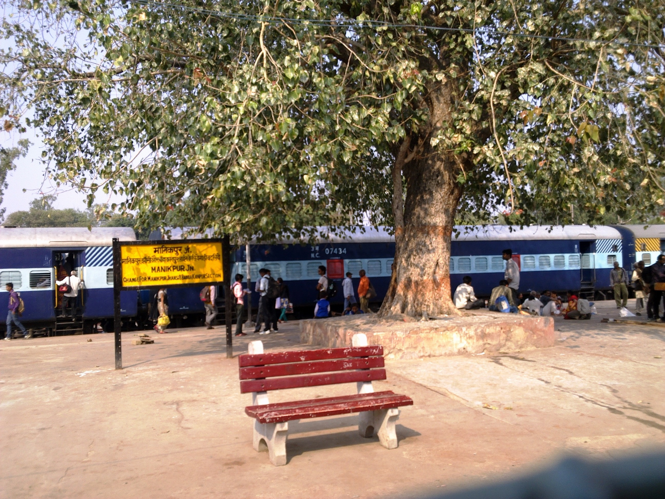 Manikpur Jn 2015in04alhb_002